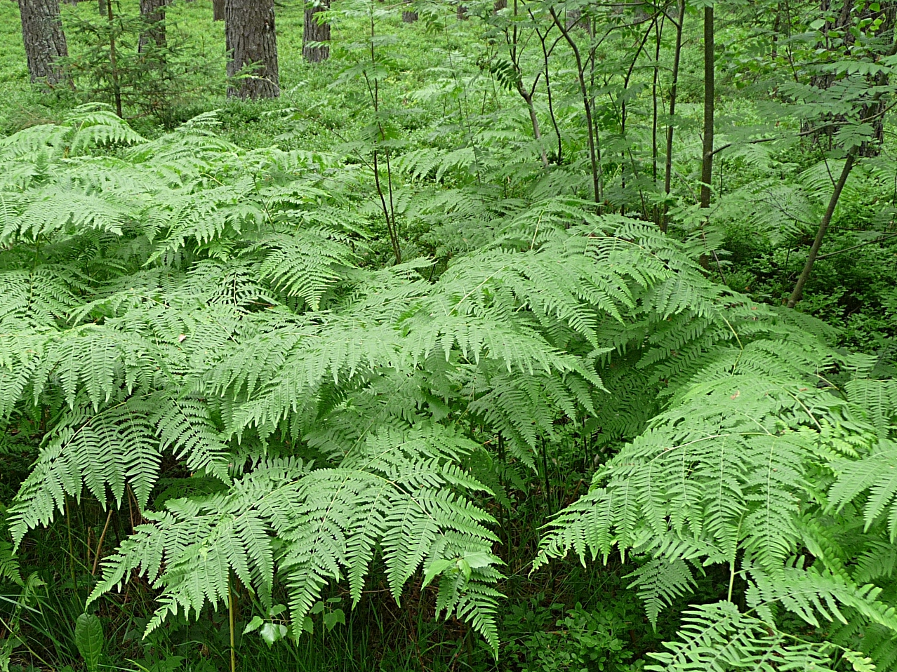 Adlerfarn bei Lindberg